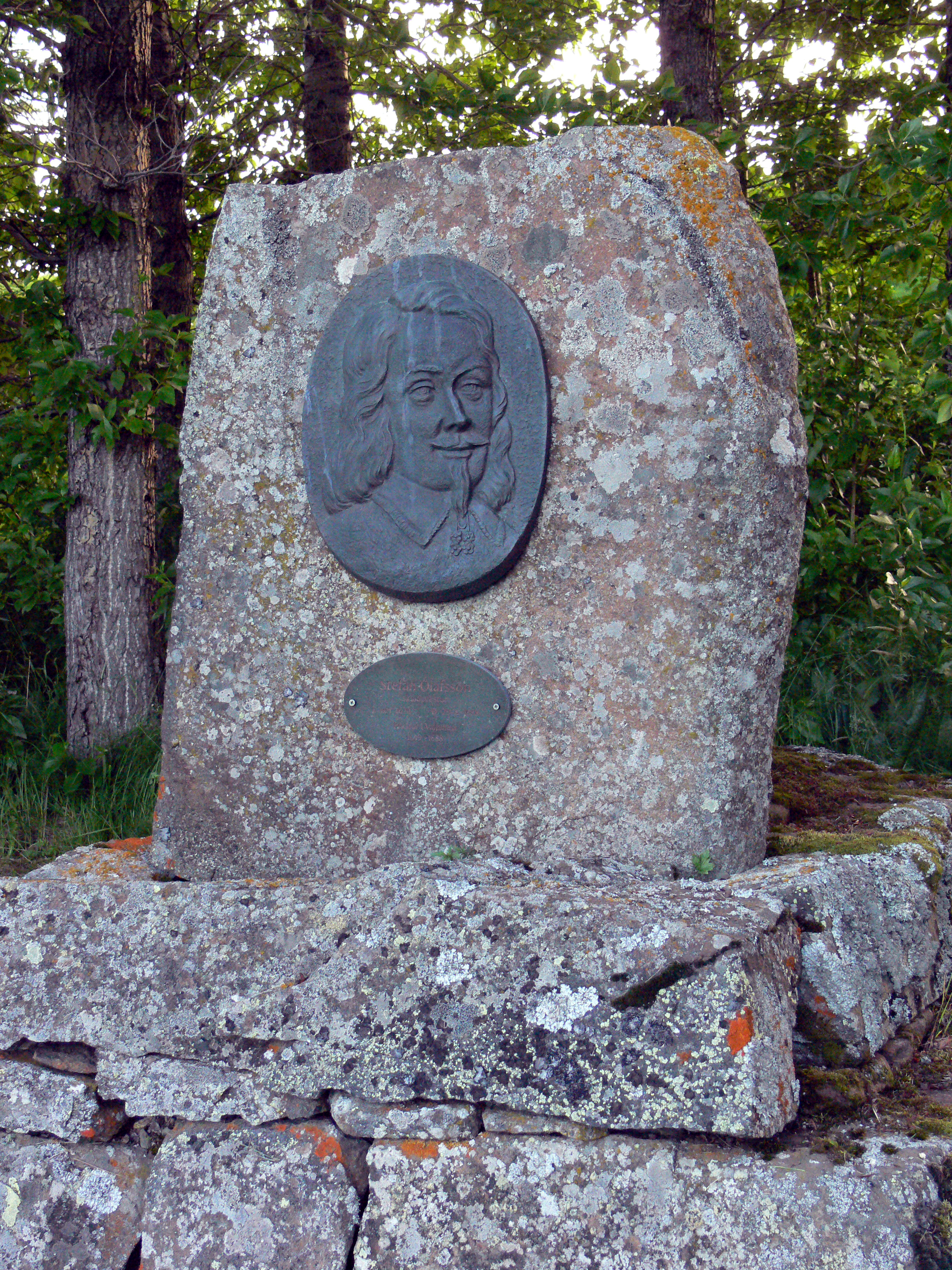 Gedenkstein auf dem Friedhof der Vallanes-Kirche für den Dichter und Pfarrer Stefán Ólafsson (ca. 1620- 29.8.1688). Pfarrer in Vallanes 1849-1688.